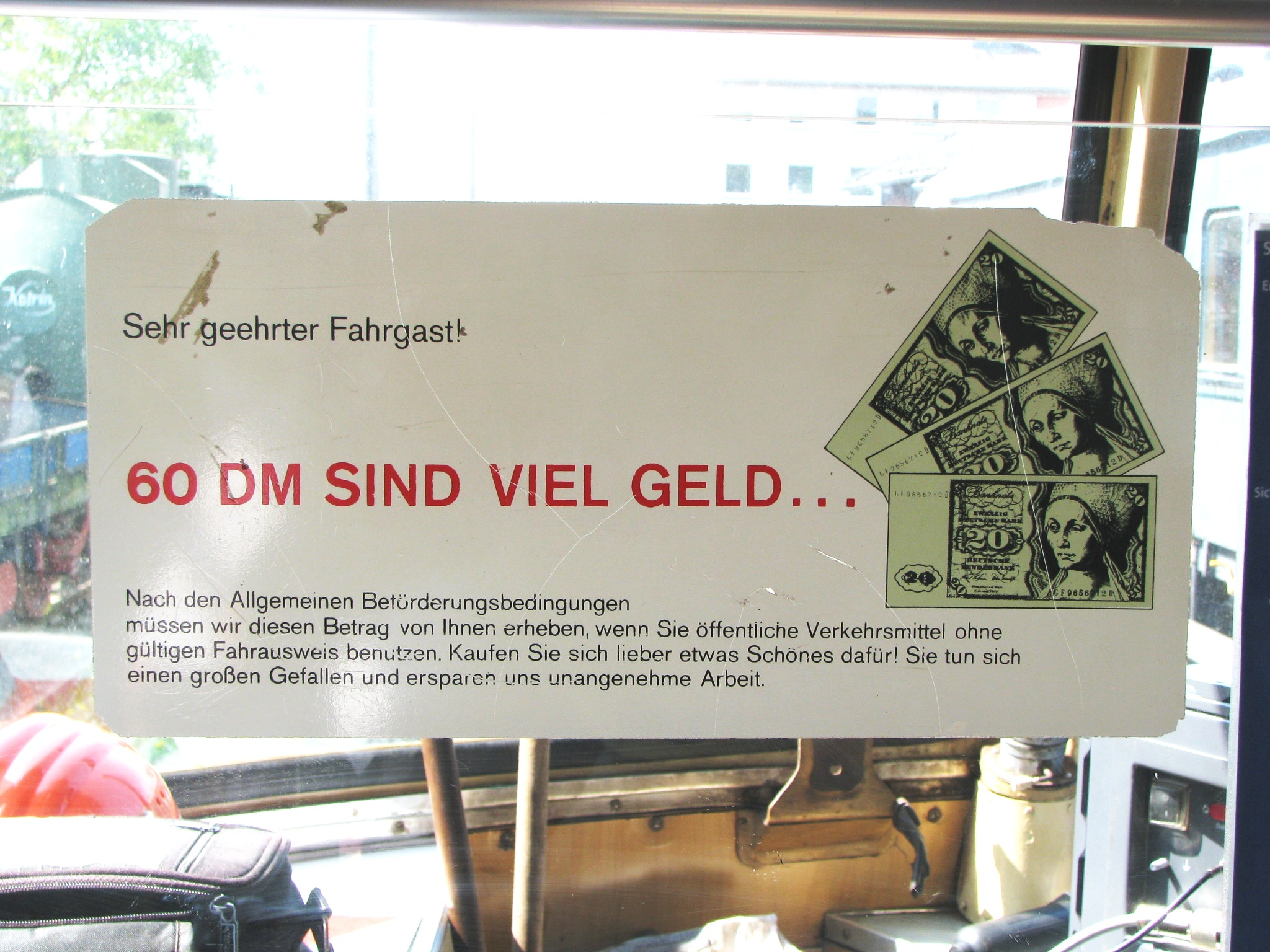 Hinweis für Schwarzfahrer in einem MAN-Schienenbus